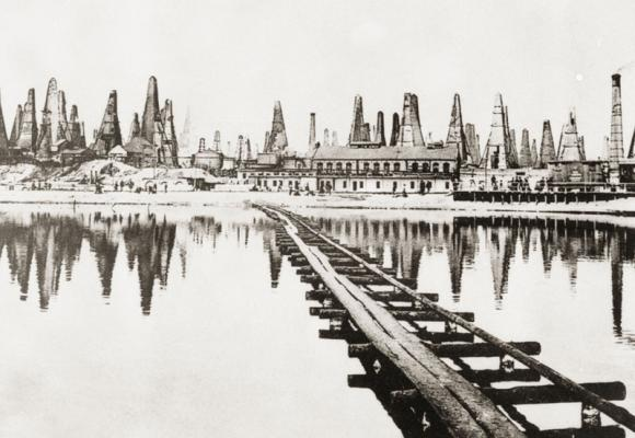 Бакинские нефтяные промыслы 1900 год.